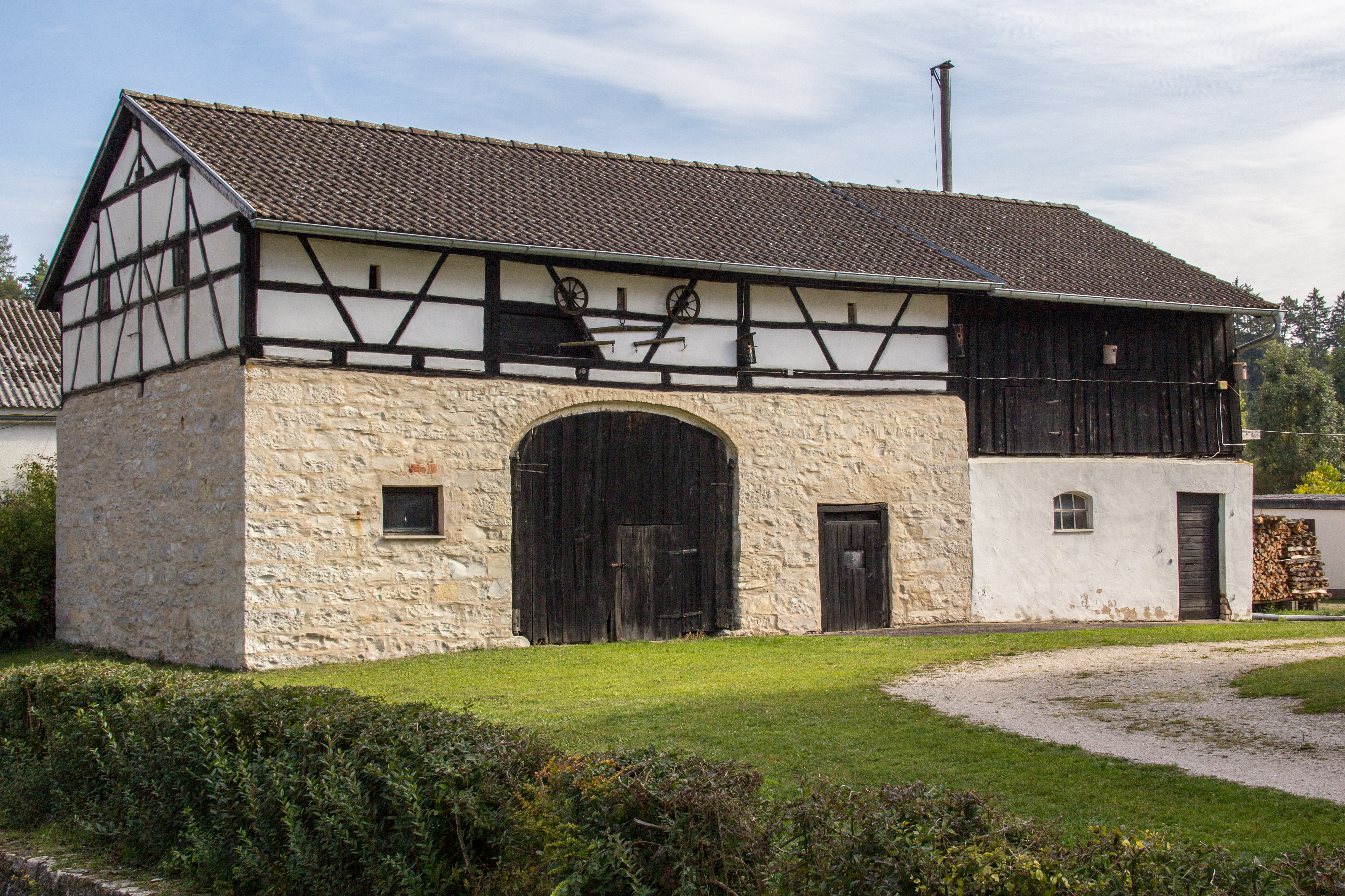 Scheune, Satteldachbau auf Bruchsteinsockel mit Fachwerkoberteil, ehemals mit Kalkplatten, mittig Rundbogentor, erste Hälfte 19. Jahrhundert.